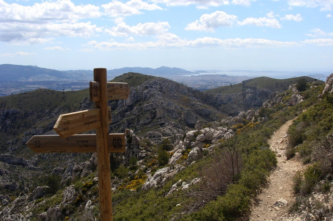 Massif de l'Étoile : balisage du comité départemental du tourisme près du col Sainte-Anne ; au fond à droite, Marseille et la mer.